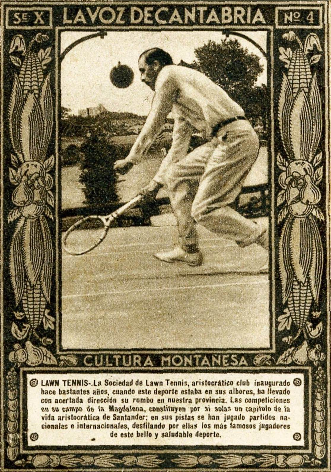 Jacobo Fitz-James Stuart Falcó, xvii duque de Alba, jugando al Tenis en la Real Sociedad de Tenis de la Magdalena en 1927. Se sabe que el duque era más aficionado al golf, con lo que fundó el Real Club de Golf de Pedreña, a escasos kilómetros del club.